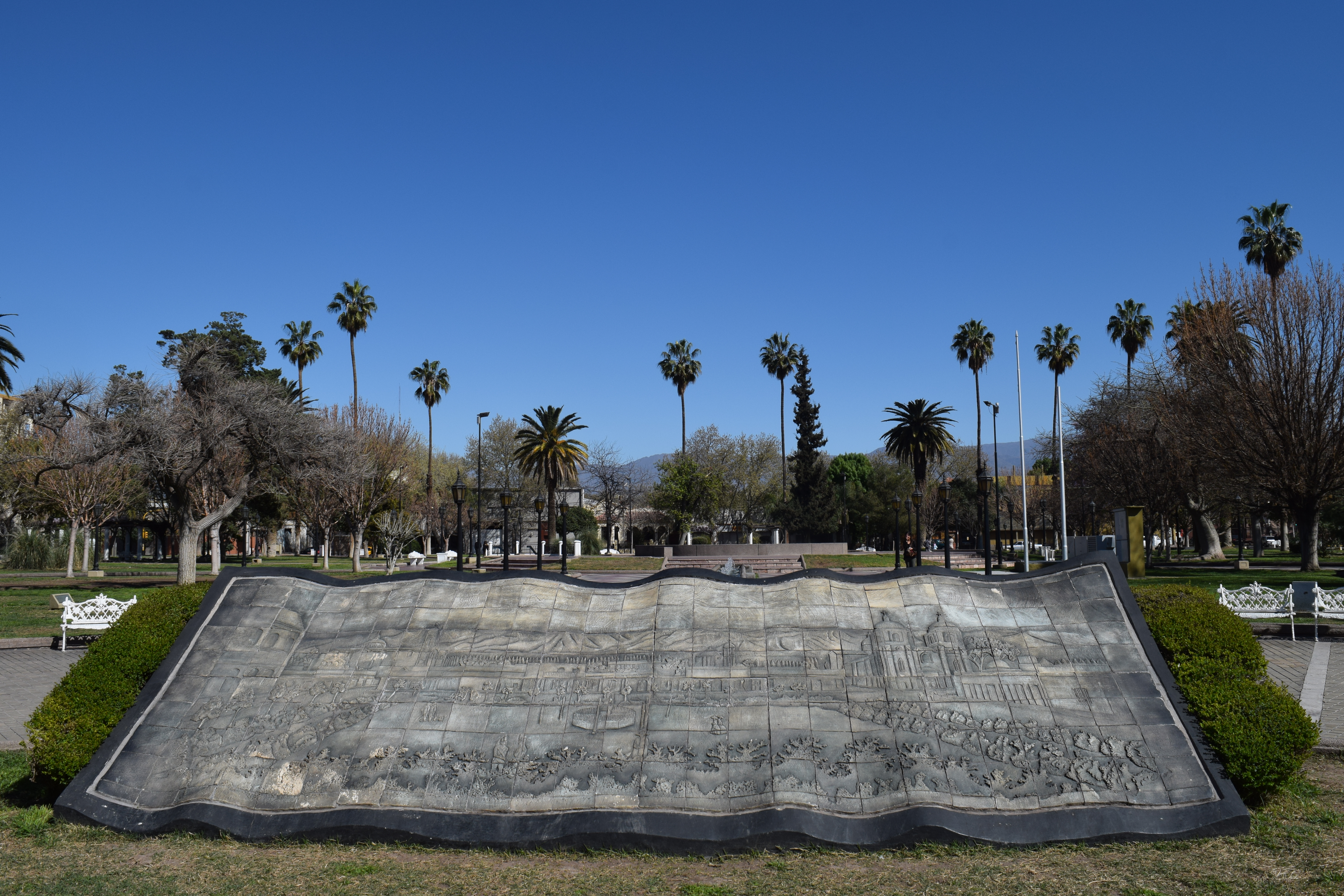 La Plaza Pedro del Castillo en la ciudad vieja de Mendoza, destruida por el terremoto de 1861.